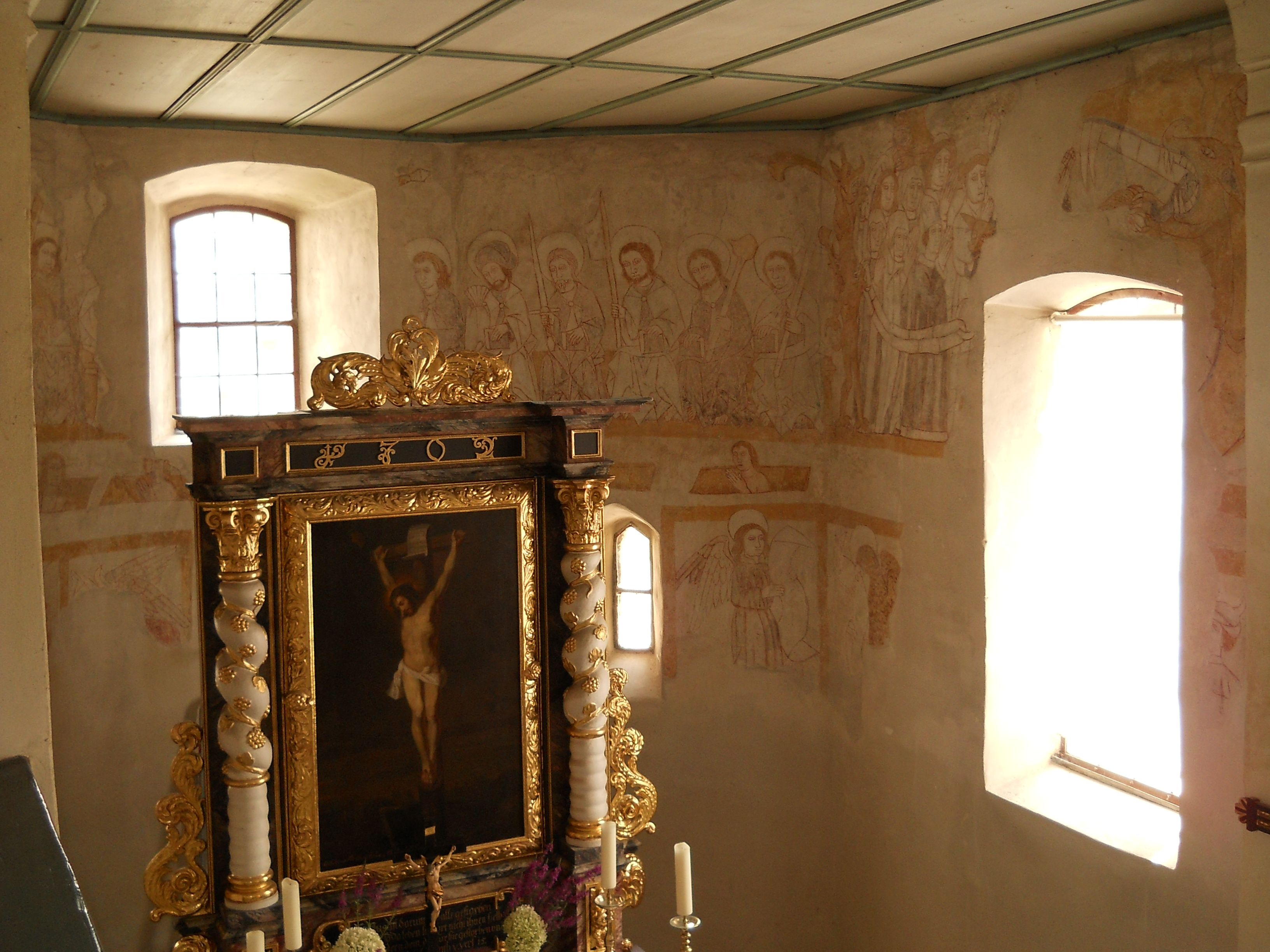 Graben, Ortsteil der Stadt Treuchtlingen im mittelfränkischen Landkreis Weißenburg-Gunzenhausen, Chor der Dorfkirche mit mittelalterlichen Fresken